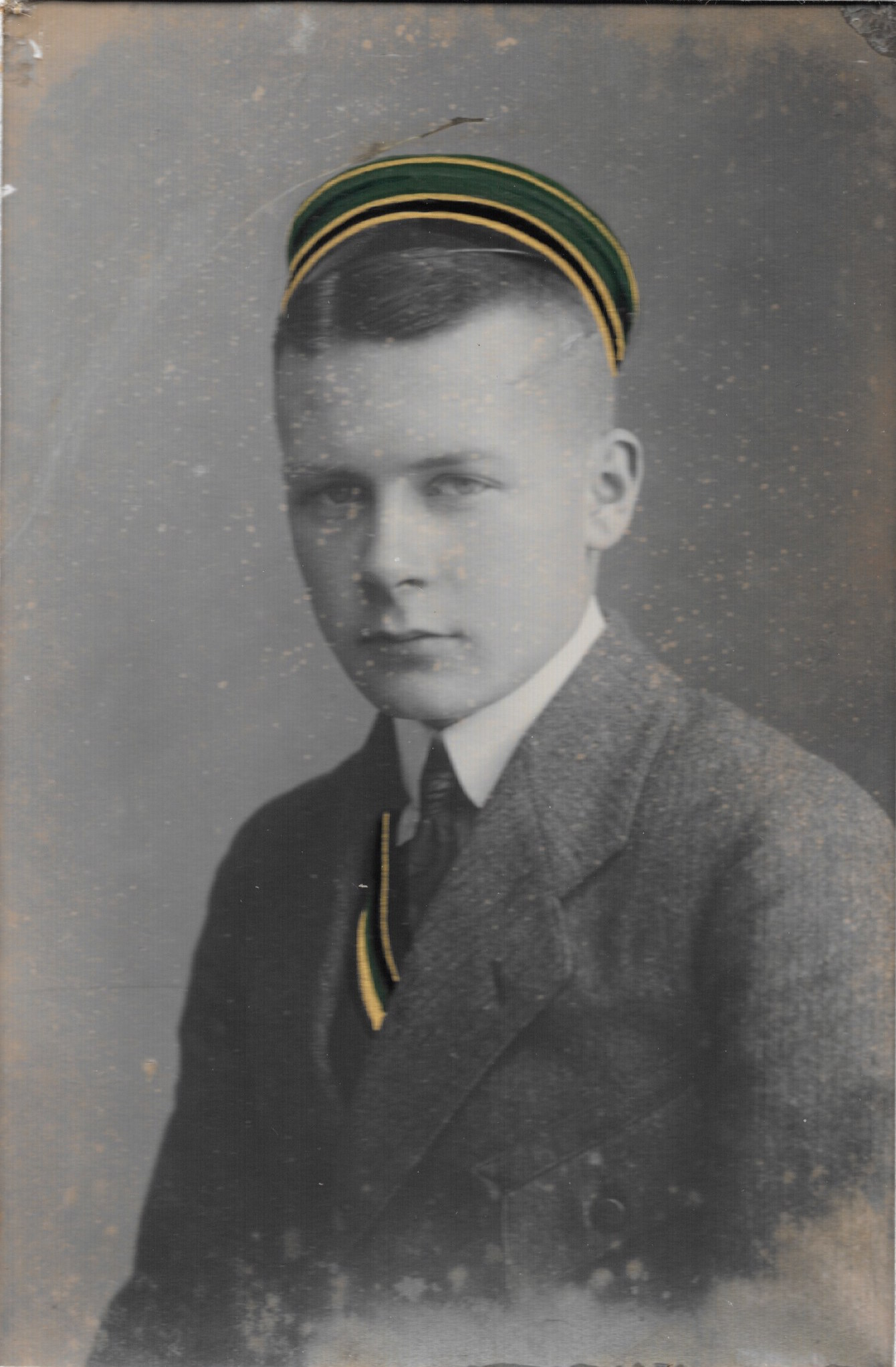 Carl Pietscher Porträt des Corps Teutonia-Hercynia